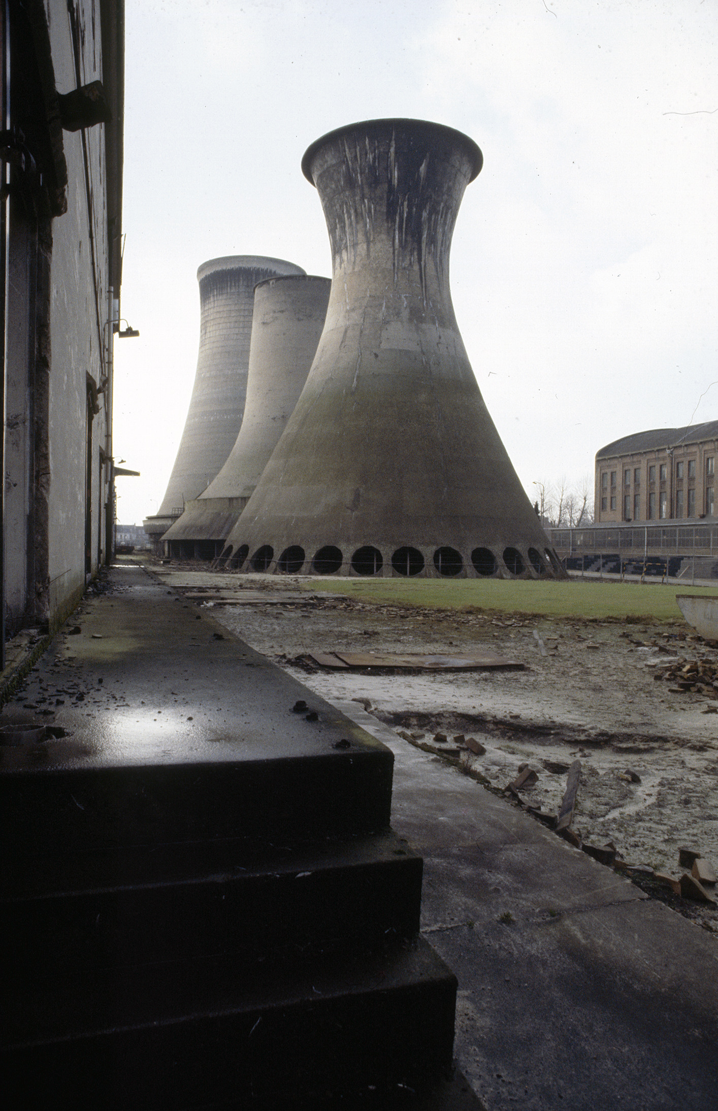 Staatsmijn Emma: Exterieur OVERZICHT KOELTOREN III (gesloopt)